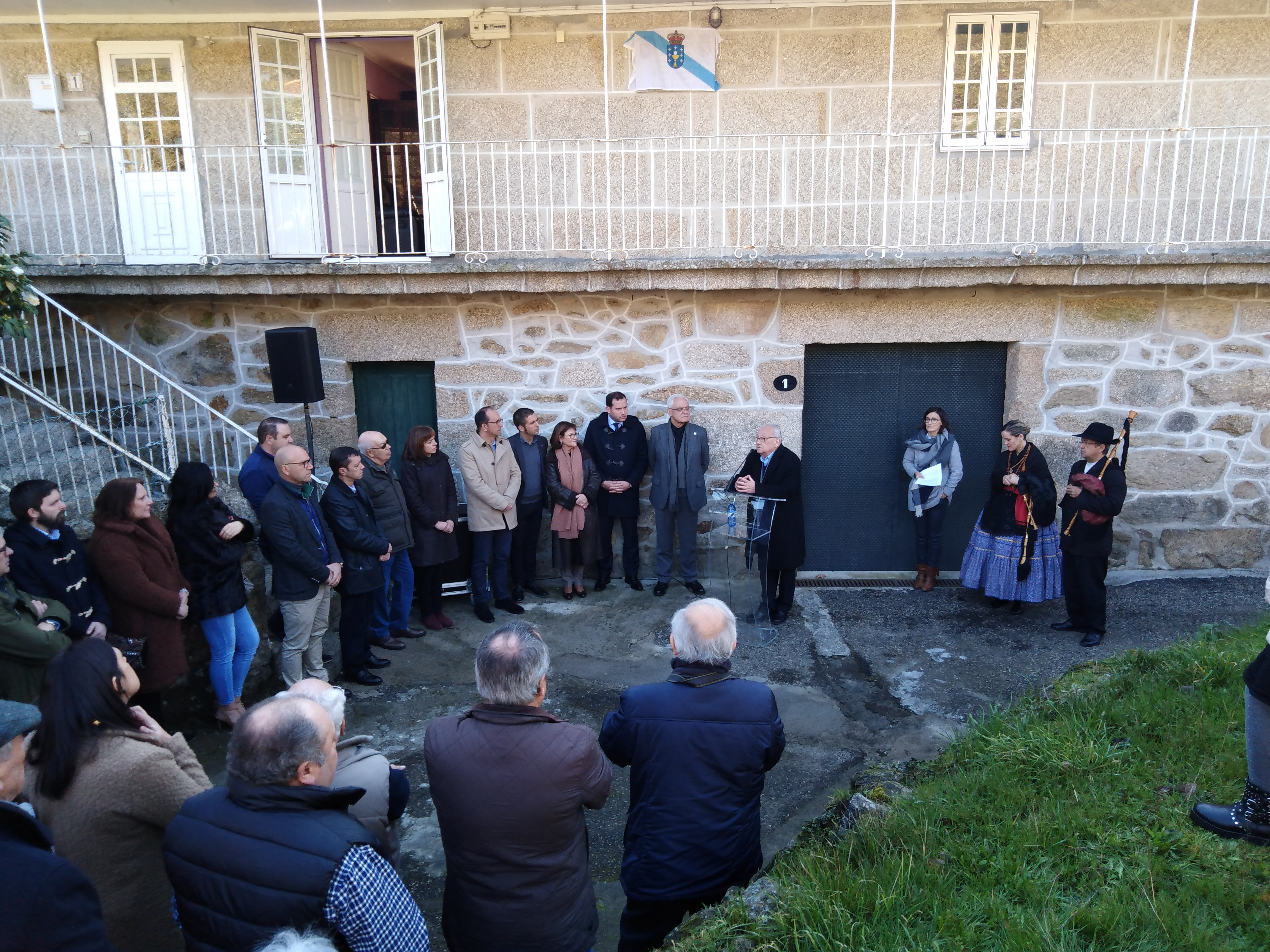 Inauguración dos actos do Día das Letras Galegas 2019 na Casa natal de Antonio Fraguas en Insuela (Loureiro, Cotobade)